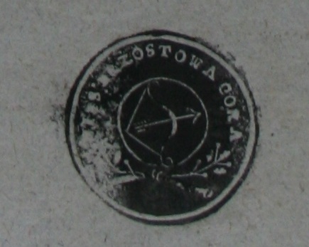 polski